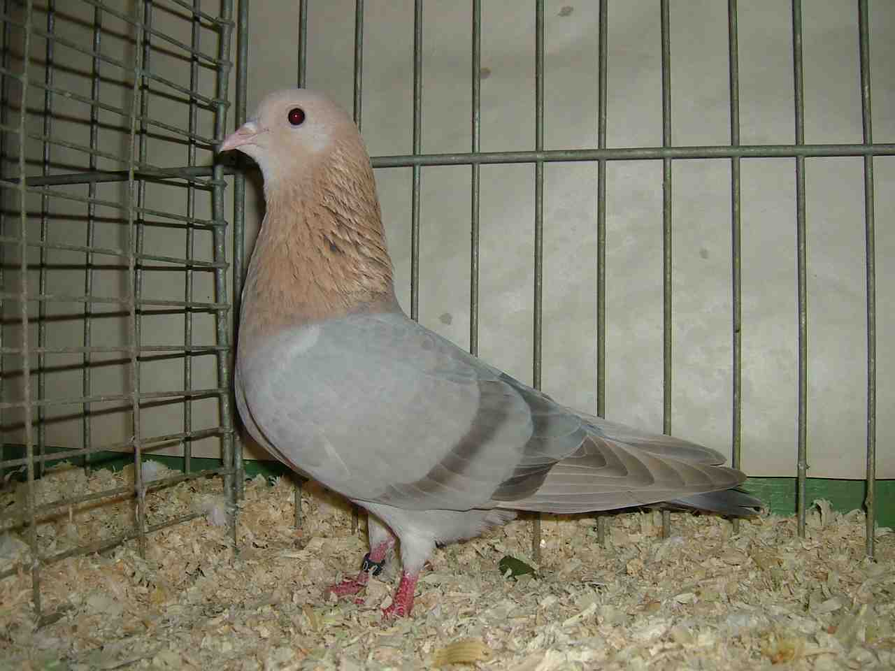 Arabische Trommeltauben